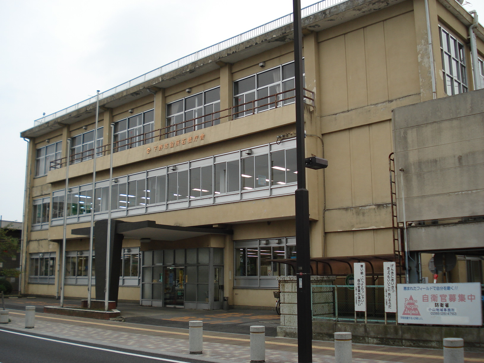 栃木県下野市役所石橋庁舎